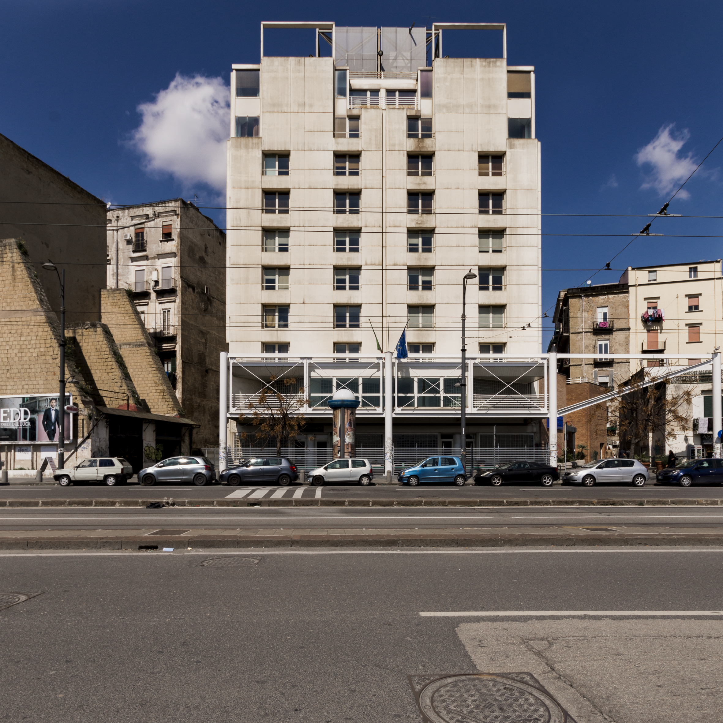 Prospetto di Palazzo Mediterraneo in via Nuova Marina